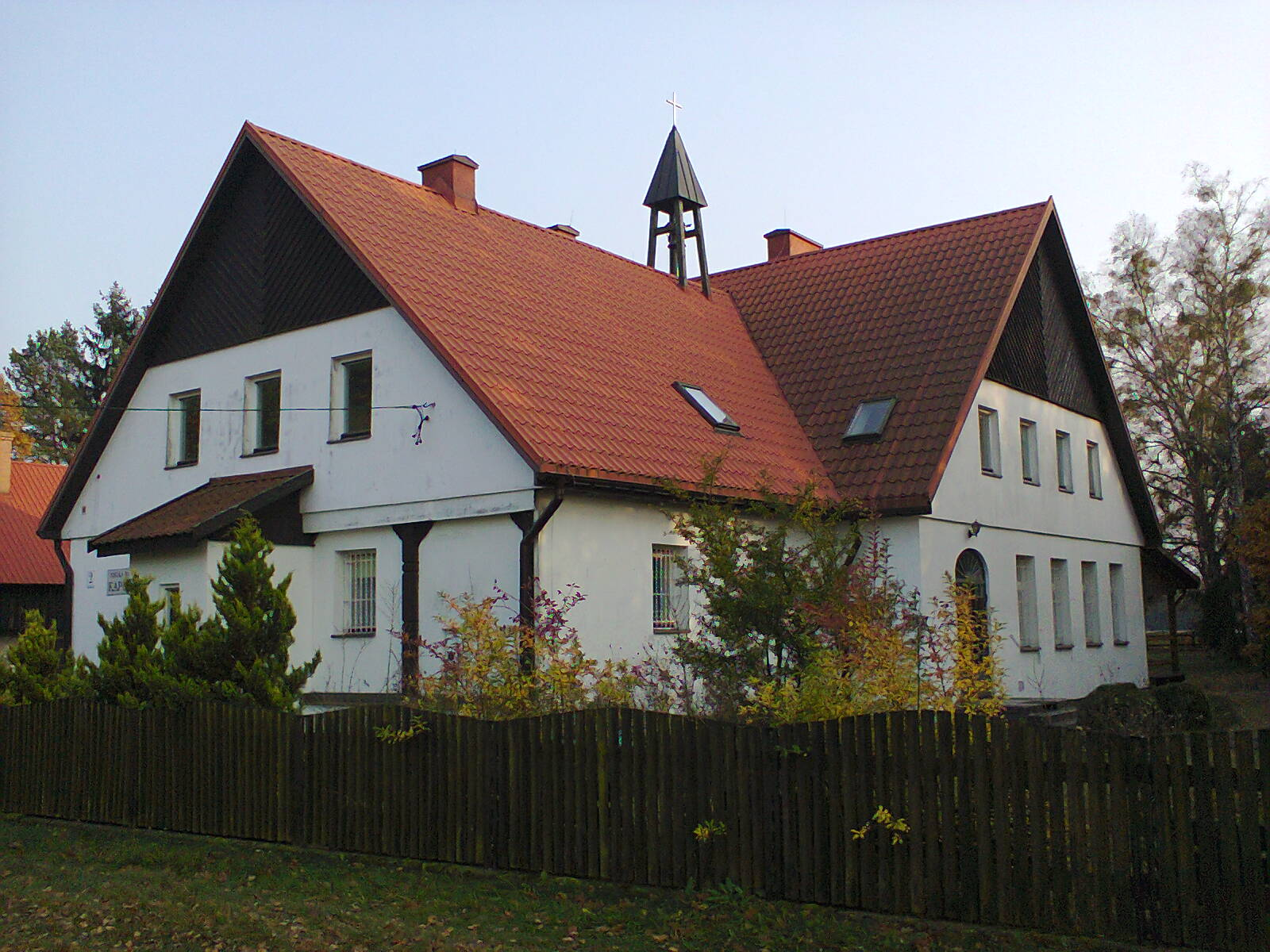 Zdunowo - kaplica (powiat piski)